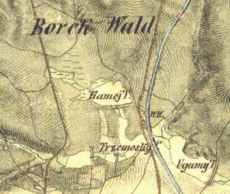 Kamenný rybník (Kamej T.) a přilehlé mokřady a rašeliniště na severozápad od něj na výřezu z mapy II. vojenského mapování.